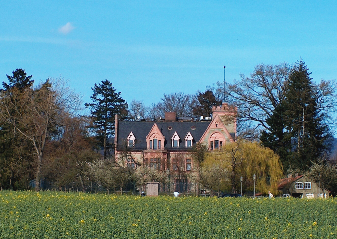 en.: Rettershof at Kelkheim near Frankfurt, Germany; dt.: Rettershof in Kelkheim bei Frankfurt/Main